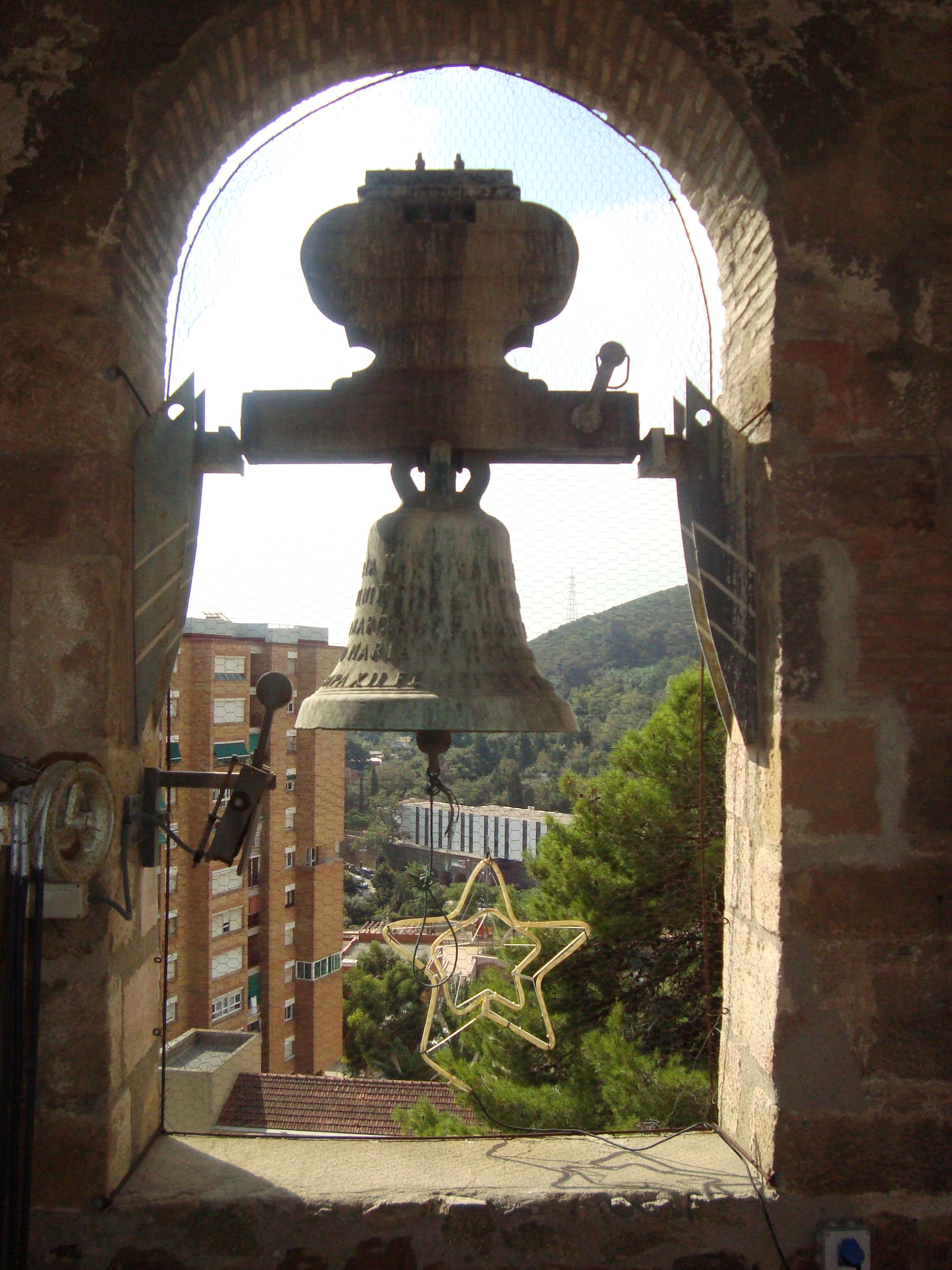 Conjunt de Sant Genís dels Agudells (Barcelona)